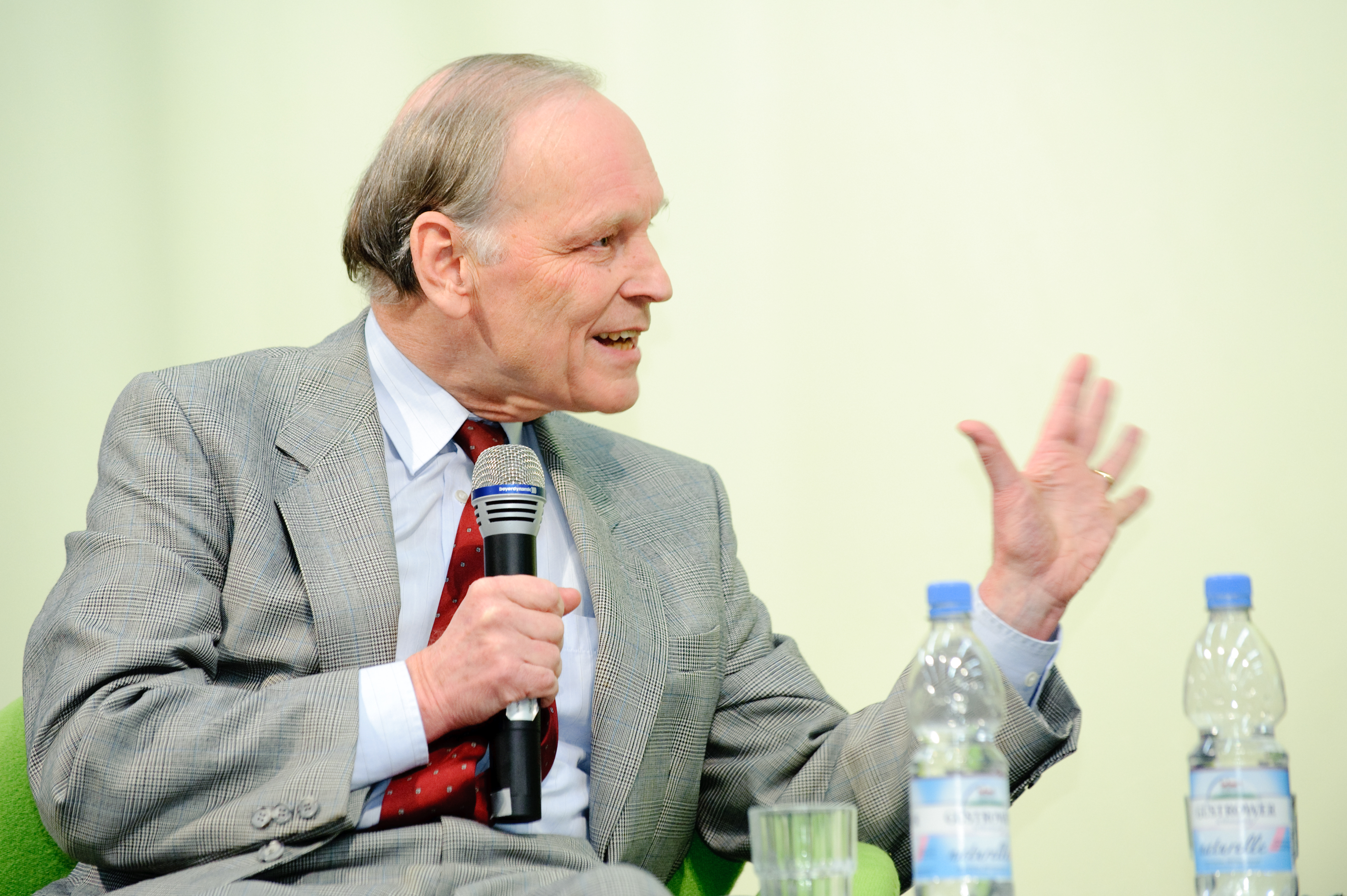 Über das Verhältnis von europäischer Integration und Demokratie, über die Auswirkungen des Lissabon-Vertrags und die Zukunft der Europäischen Union diskutieren: Prof. Dr. Ulrich K. Preuß (Rechtswissenschaftler, Hertie School of Governance, Berlin) Dr. Michaele Schreyer (Mitglied der Europäischen Kommission, a.D., Berlin) Prof. Dr. Peter Graf Kielmansegg (Politikwissenschaftler, Universität Mannheim) Moderation: Dr. Christine Pütz, Referentin Europäische Union in der Heinrich-Böll-Stiftung Foto: Stephan Röhl